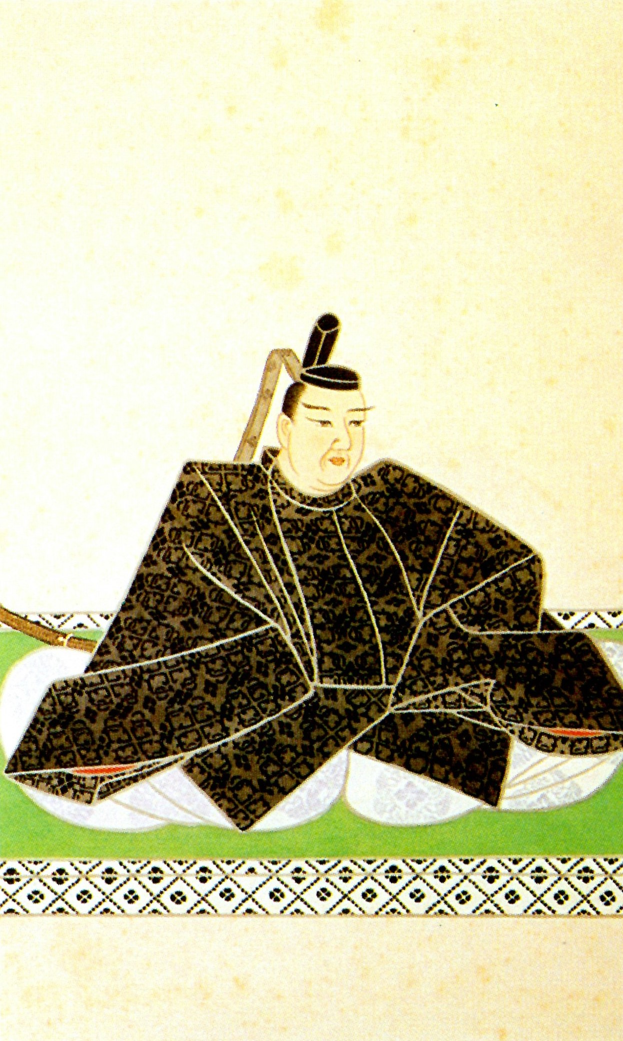 戸田氏西の肖像。